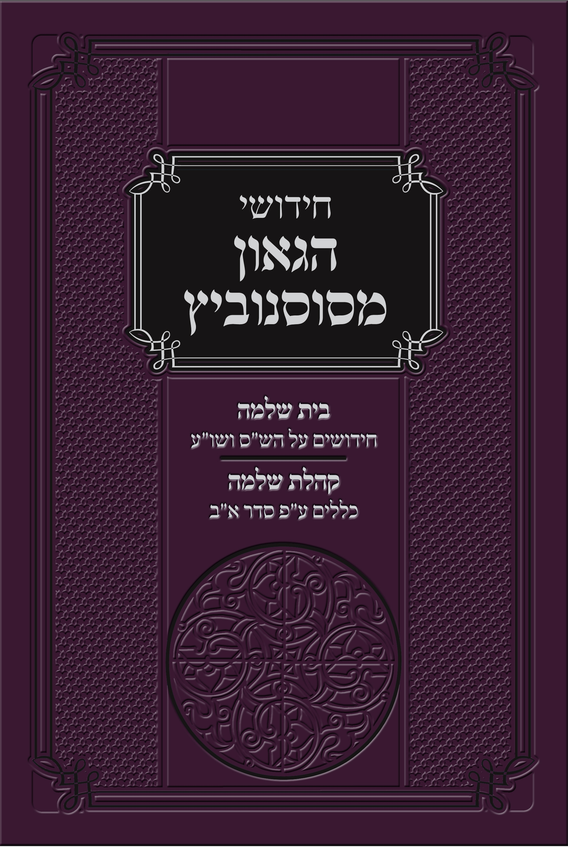 כריכת ספרו של הגאון מסוסנוביץ רבי שלמה שטענציל זצ"ל מחבר ספרים קהלת שלמה וספר בית שלמה